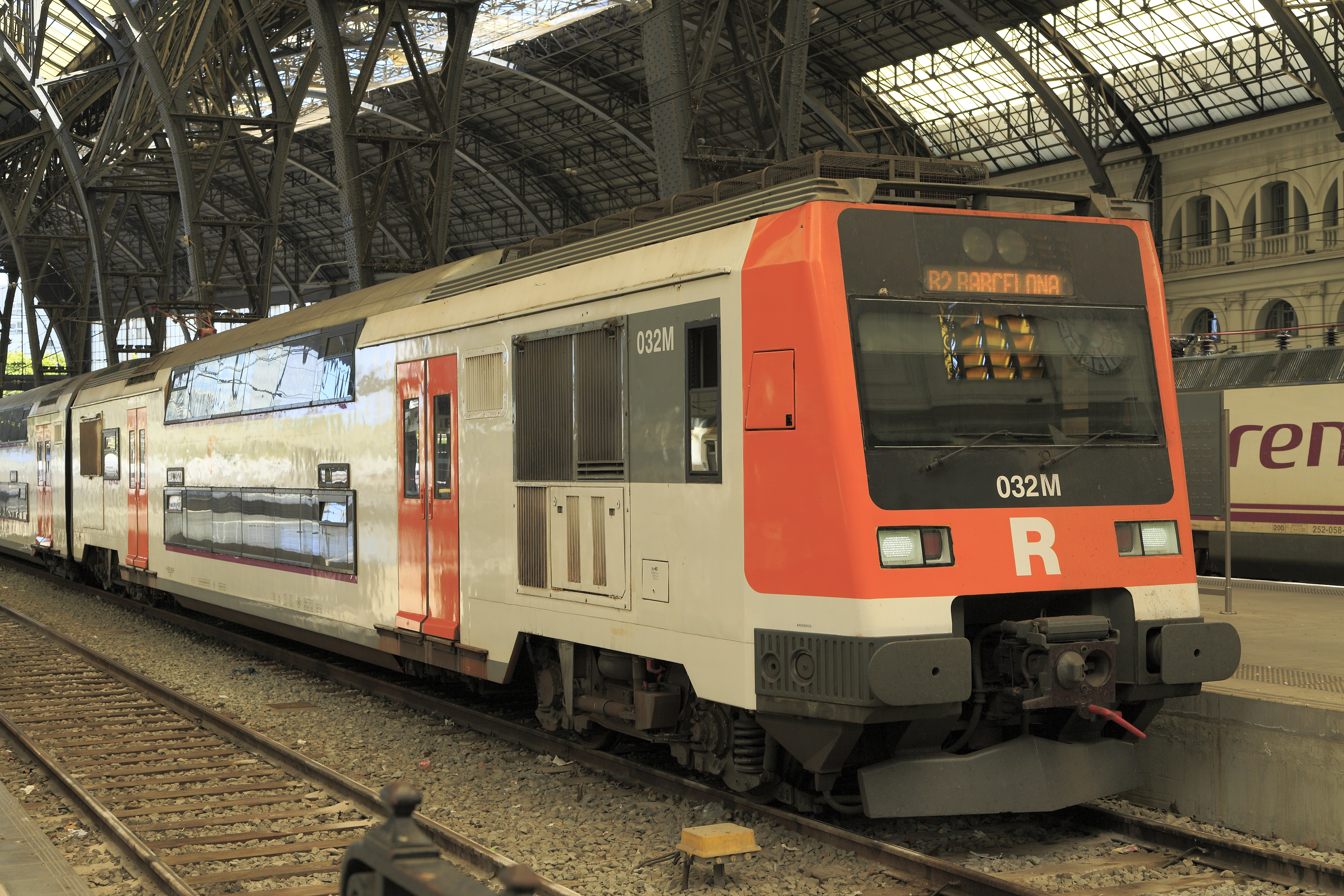 Doppelstocktriebwagen, im Gegensatz zu den Mittelwagen befinden sich die Einstiege aus Massegründen nicht über den Drehgestellen.Inzwischen sind die Wagen der S-Bahn-Netze in Katalonien in einem eigenen Farbschema lackiert und mit »R« für Rodalies statt »C« für Cercanías gekennzeichnet.